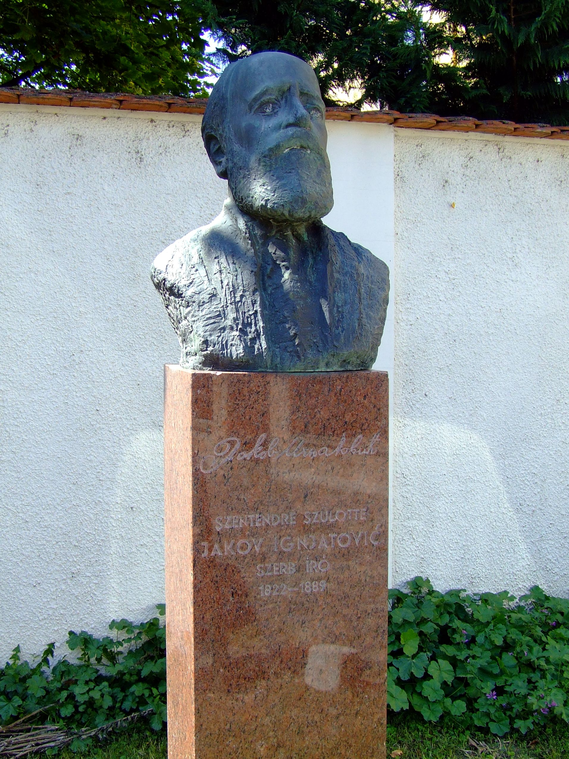 Jakov Ignjatović (1822–1889) magyarországi születésű szerb író, publicista, honvédtiszt, országgyűlési képviselő mellszobra Szentendrén. Jenzer Frigyes (*1939) szobrászművész alkotása (1977)